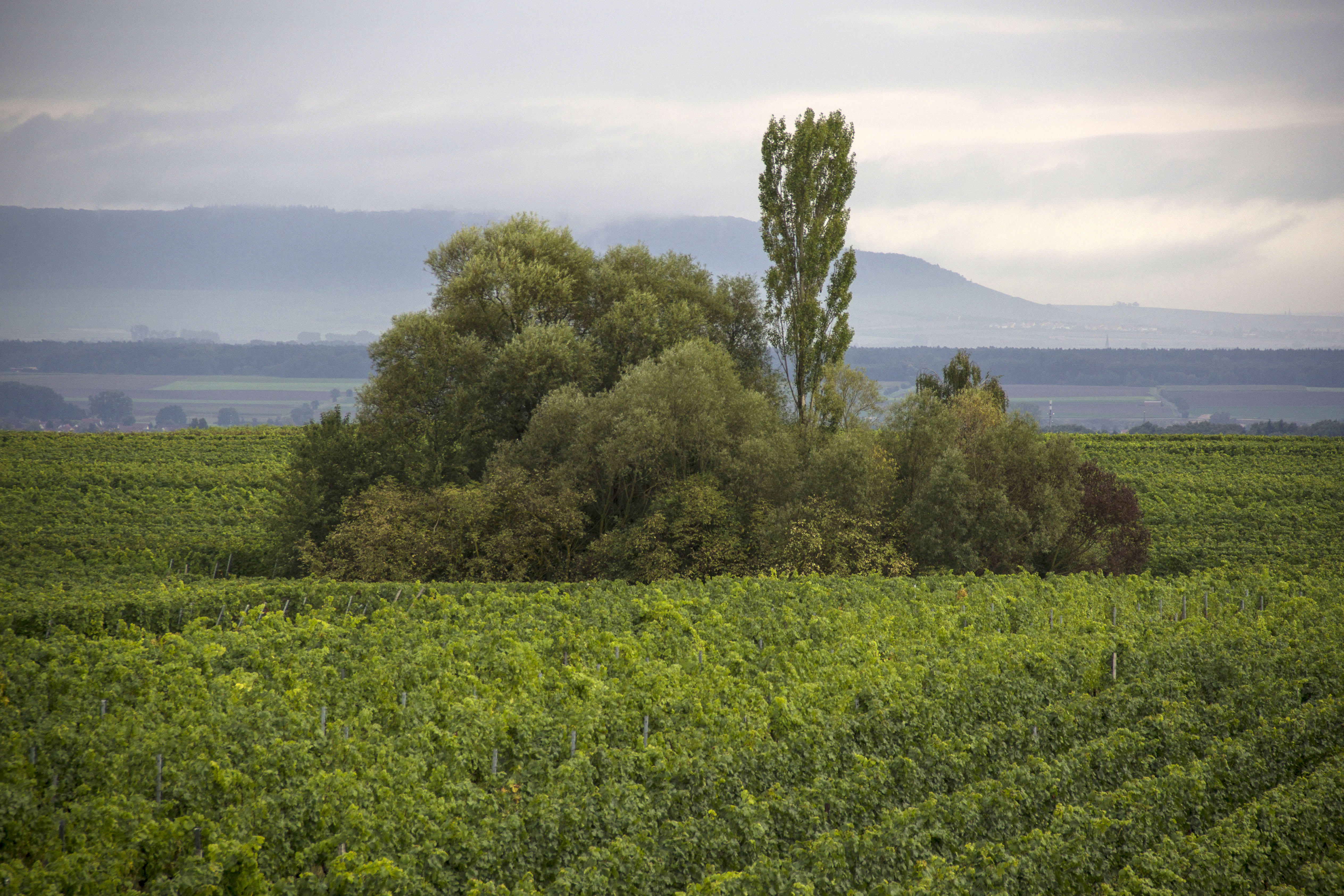 Geotop, Sommerach